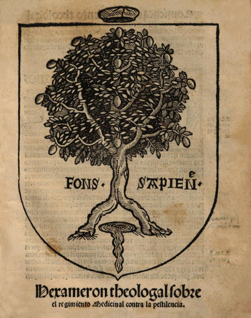 Portada de la primera edición del libro de Pedro Ciruelo titulado "Hexameron theologal sobre el regimiento medicinal contra la pestilencia". Publicado en Alcalá de Henares, en la imprenta de Arnao Guillén de Brocar el 15 de julio de 1519.